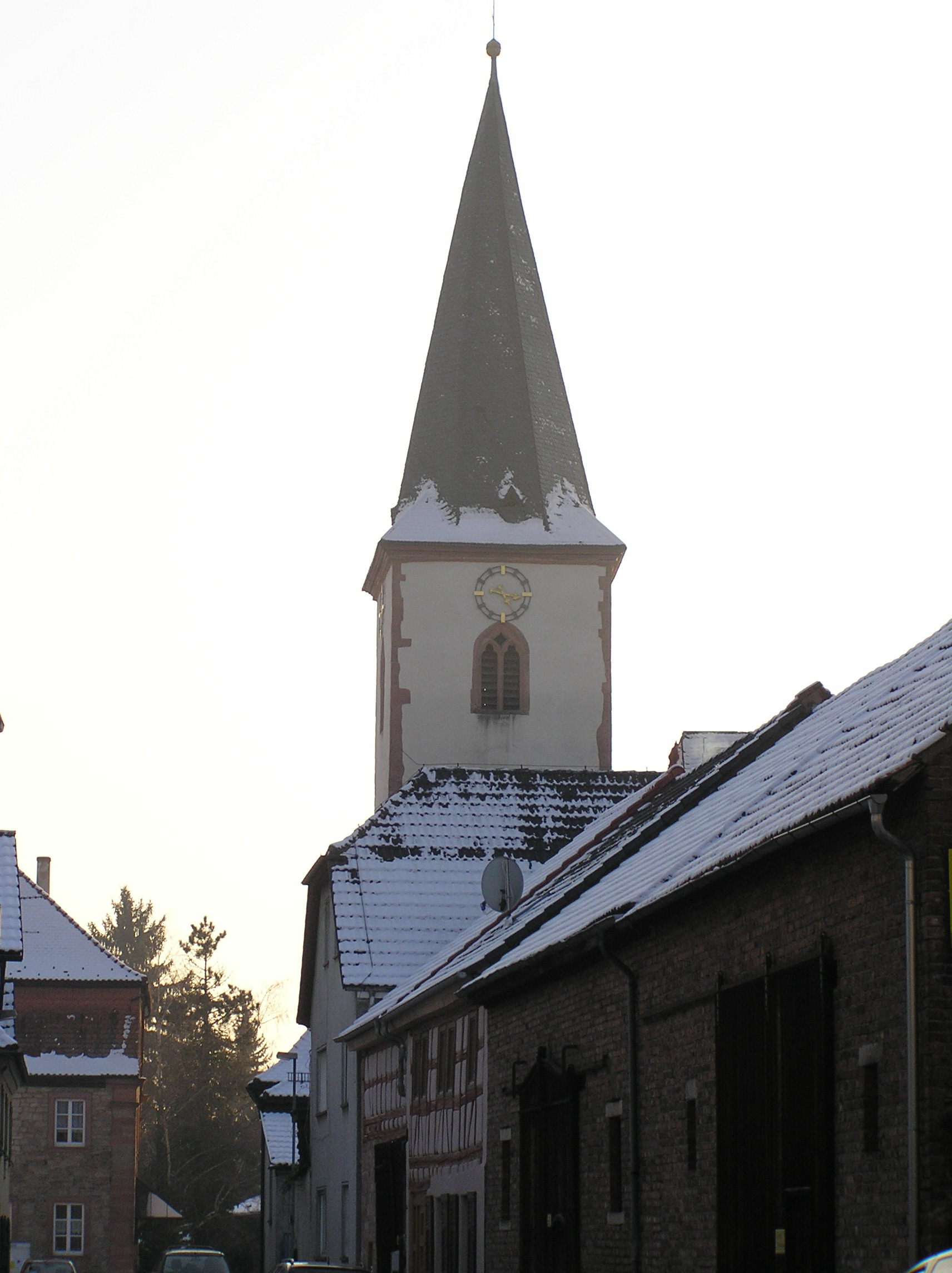 Die Kleinwallstädter Kirche